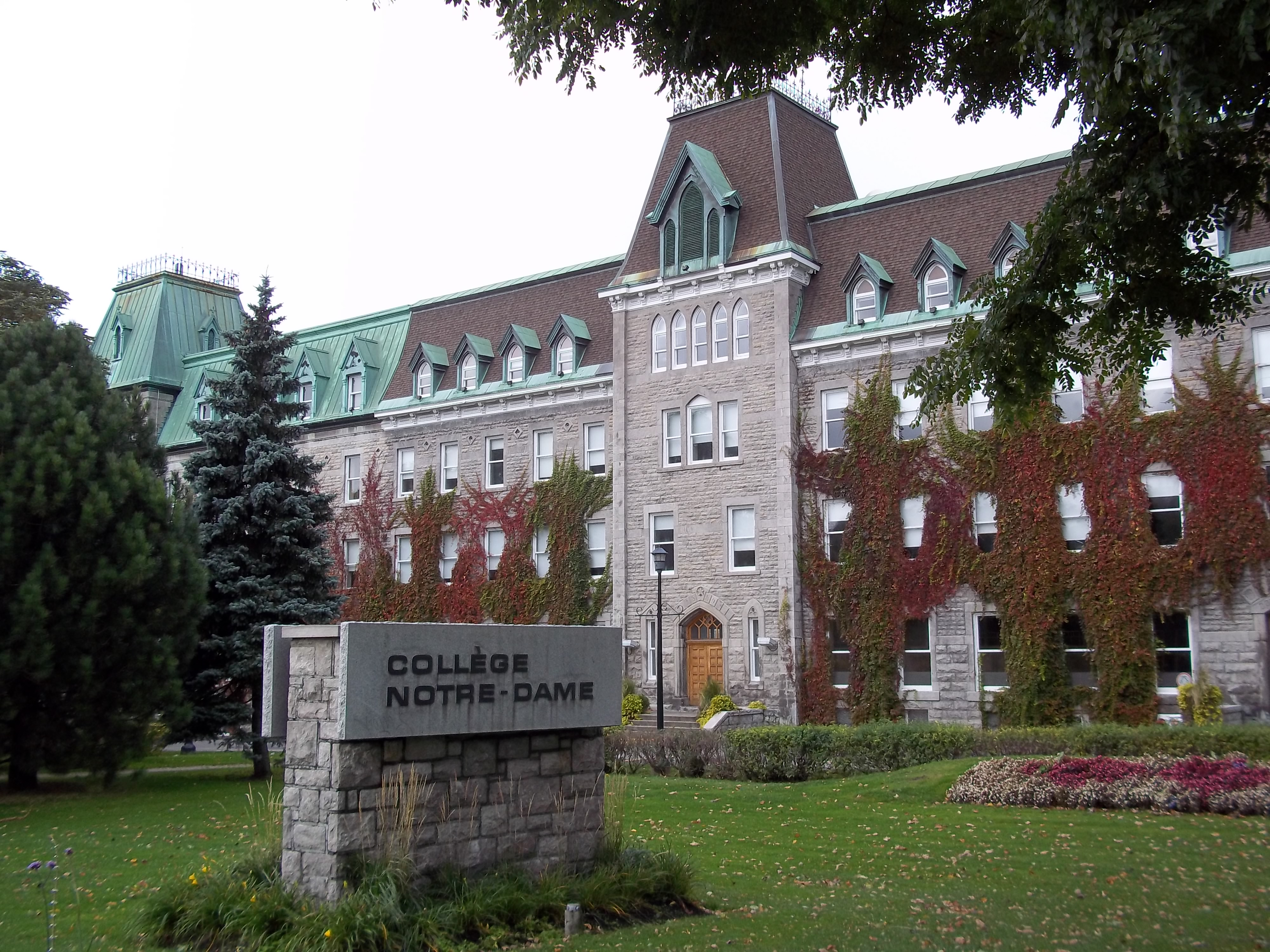 Collège Notre-Dame, 3791, chemin Queen-Mary, Montréal